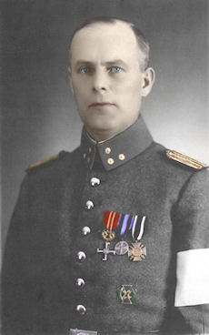 Ratsumestari Harry Wihtol